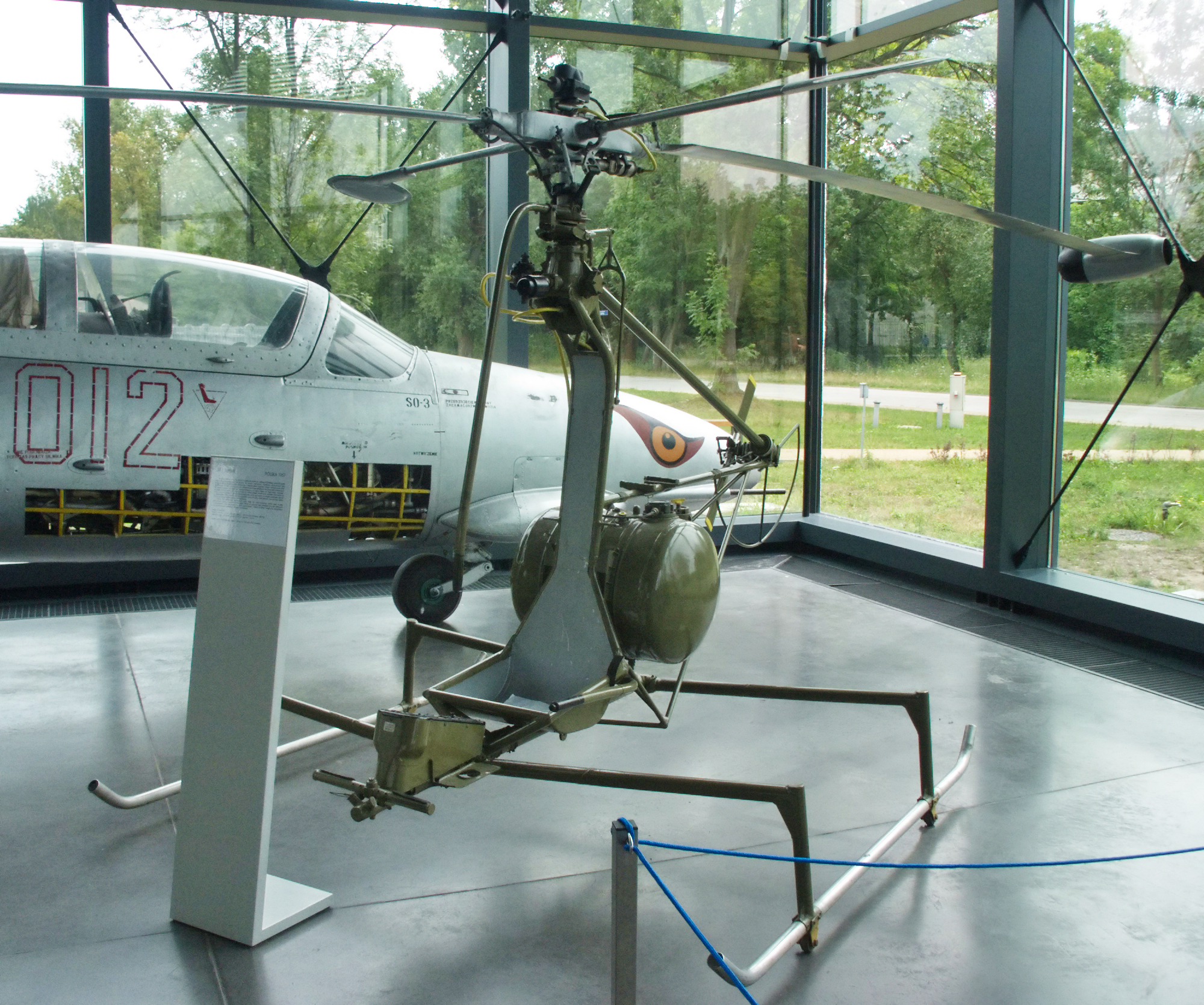 JK-1 Trzmiel - Muzeum Lotnictwa Polskiego w Krakowie